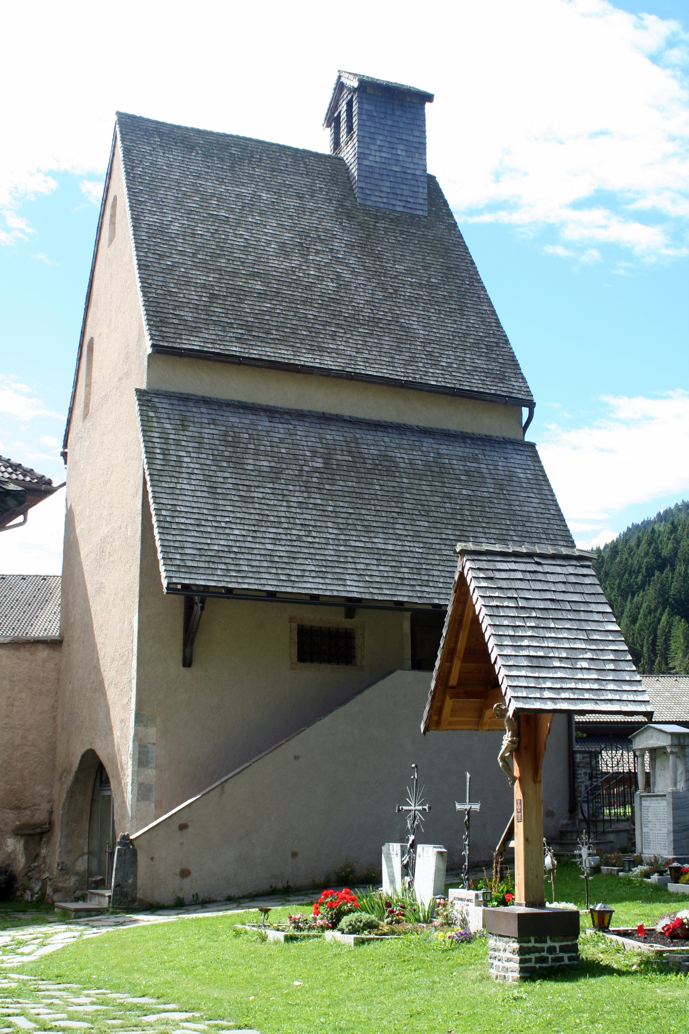 Friedhofskapelle bei der Pfarrkirche Unsere Liebe Frau im Walde